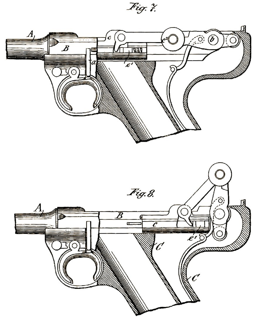 Funktion der Borchardt-Luger Modell 1898 Pistole. Aus der Schweiz. Patentschrift Nr. 17977 vom 3. Okt. 1898